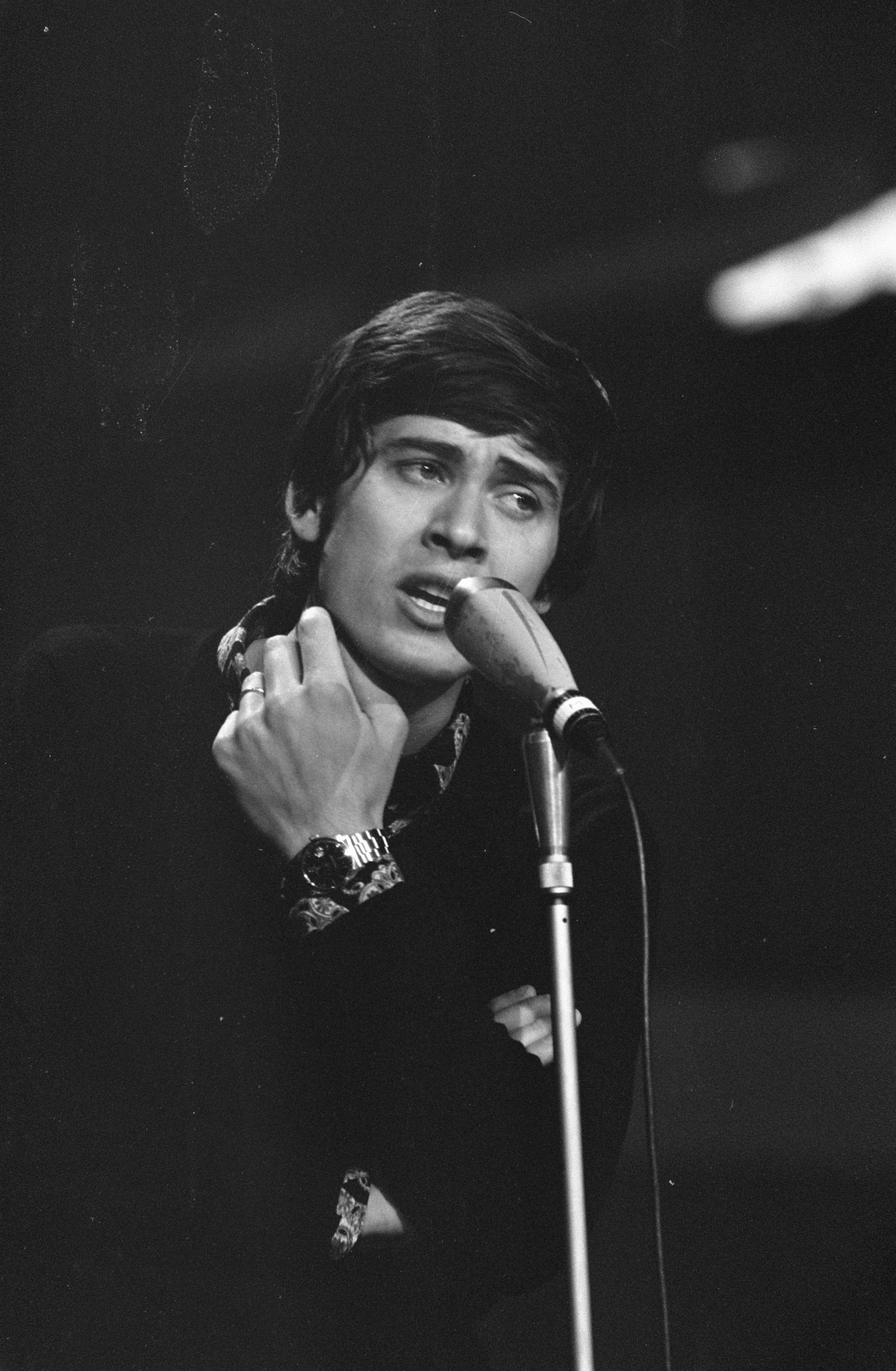 Collectie / Archief : Fotocollectie Anefo Reportage / Serie : [ onbekend ] Beschrijving : Eurovisie Song Festival in RAI Amsterdam, repetities. Gianni Morandi (Italie) zingt Datum : 18 maart 1970 Locatie : Amsterdam Trefwoorden : muziek, songfestivals, zangers Persoonsnaam : Morandi, Gianni Instellingsnaam : Eurovisie Song Festival Fotograaf : Koch, Eric / Anefo Auteursrechthebbende : Nationaal Archief Materiaalsoort : Negatief (zwart/wit) Nummer archiefinventaris : bekijk toegang 2.24.01.05 Bestanddeelnummer : 923-3595